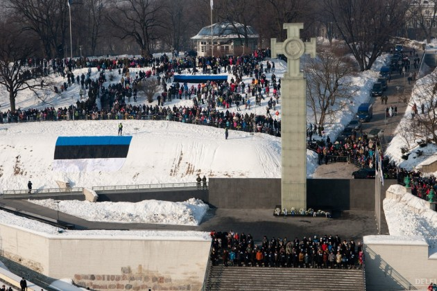 Tallinna Vabaduse väljak